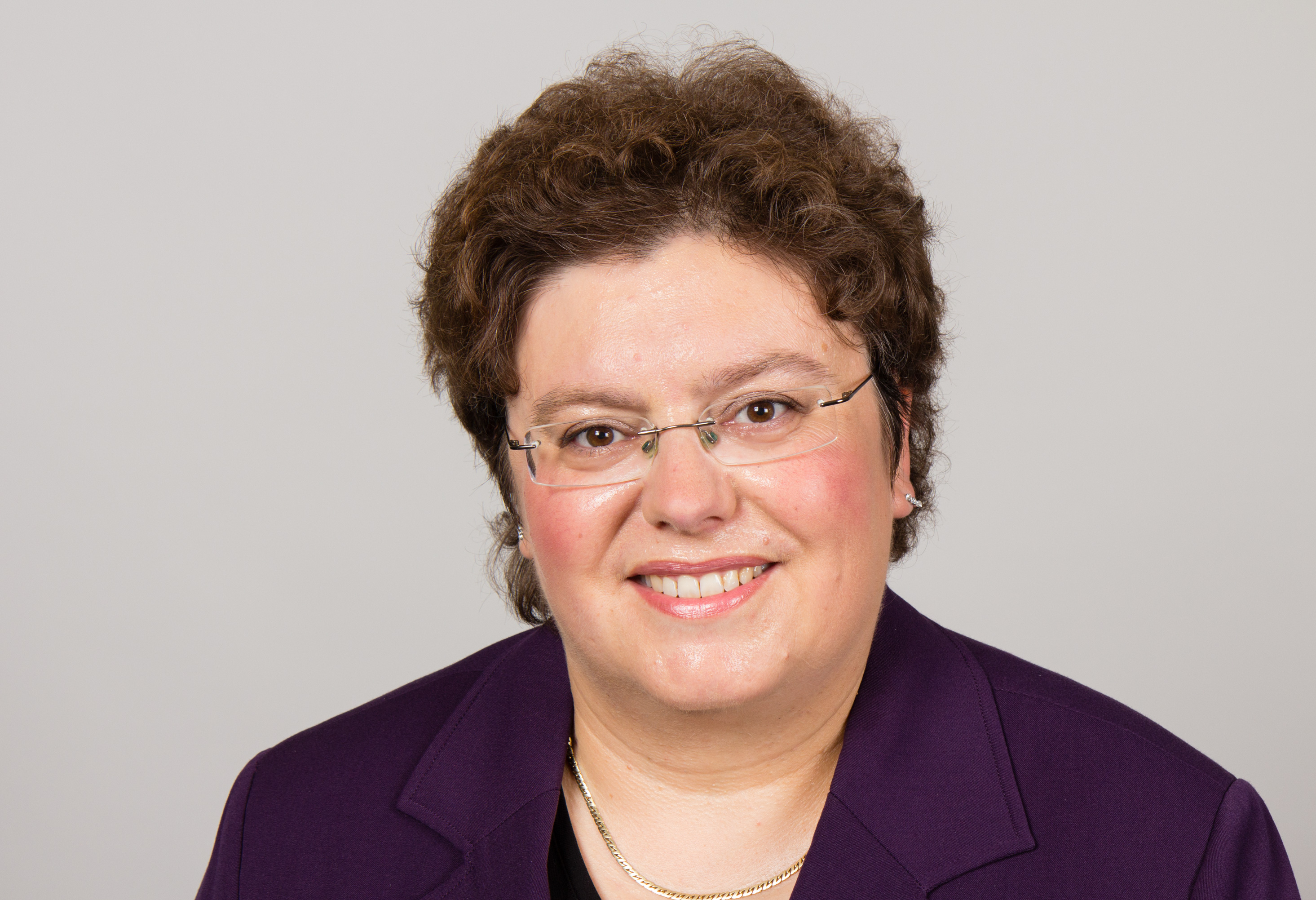 Margaret Horb (* 25. September 1967 in Osterburken) ist eine deutsche Politikerin (CDU). Wikipedia-Bundestagsprojekt 2014 8–12 September 2014 in BerlinThis file was taken during the project “Wiki loves parliaments/Bundestag 2014” (German). Organisation: Martin Rulsch, Olaf KosinskyDesign: Martin KraftPhotography: Foto-AG Gymnasium Melle (Jan-Kristof Blömke, Lukas Eismann, Moritz Kosinsky, Laura Lessing, Karsten Mosebach, Mascha Mosebach, Teresa Schreer, Noah Sewöster, Niklas Tschöpe), Olaf Kosinsky, Martin Kraft, Harald Krichel, Steffen Prößdorf, Ralf Roletschek, Martin Rulsch, Gerd Seidel, Sven TeschkeVideo: Marc Rudnick, Manuel SchneiderEditors: Marcus Cyron, Günter Fremuth, Martin Kraft, Robin Krahl, Harald Krichel, Martin Rulsch, WikiAnikaReception: DasMonstaaa, Leonie Rabea Große, Lutheraner, Nina Möllering, Martin Rulsch, WikiAnika, Foto-AG Gymnasium MelleCosmetics: Regina Bosak, Bettina Dieguez, Sandra Kobbe, Andrea Strehlke; Irada Abdullayeva, Vivien Abelmann, Olena Engelbrecht, Sarah Fabini, Nina Magnus, Jacqueline Schmidt, Leonie Taboada, Julia Willer Usage information If you need more information how to use this file, please send an email to . Personality rights warningAlthough this work is freely licensed or in the public domain, the person(s) shown may have rights that legally restrict certain re-uses unless those depicted consent to such uses. In these cases, a model release or other evidence of consent could protect you from infringement claims.